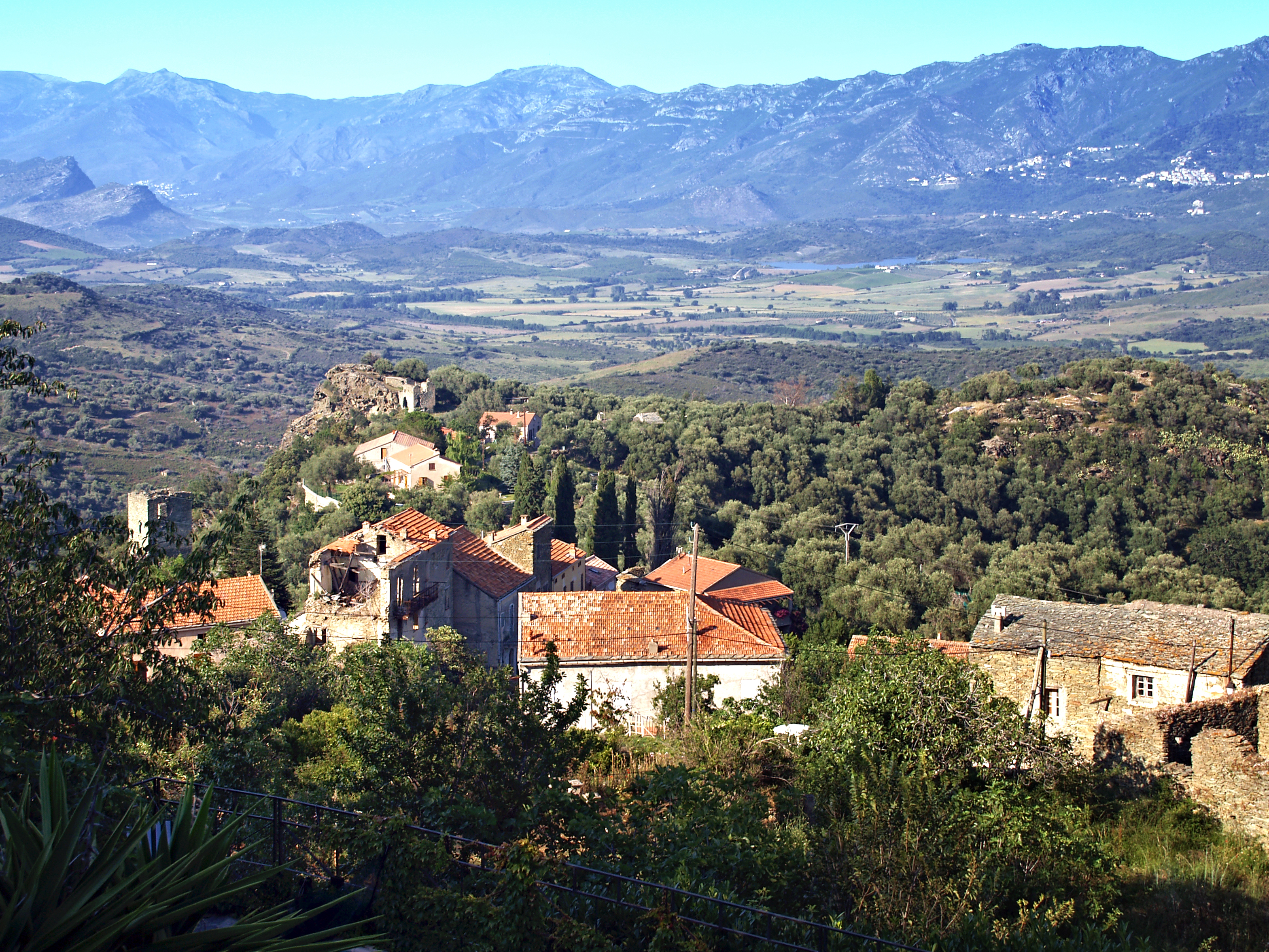 San-Gavino-di-Tenda, Nebbio (Corse) - Vue sur la Plaine d'Oletta, la "Conca d'Oro"